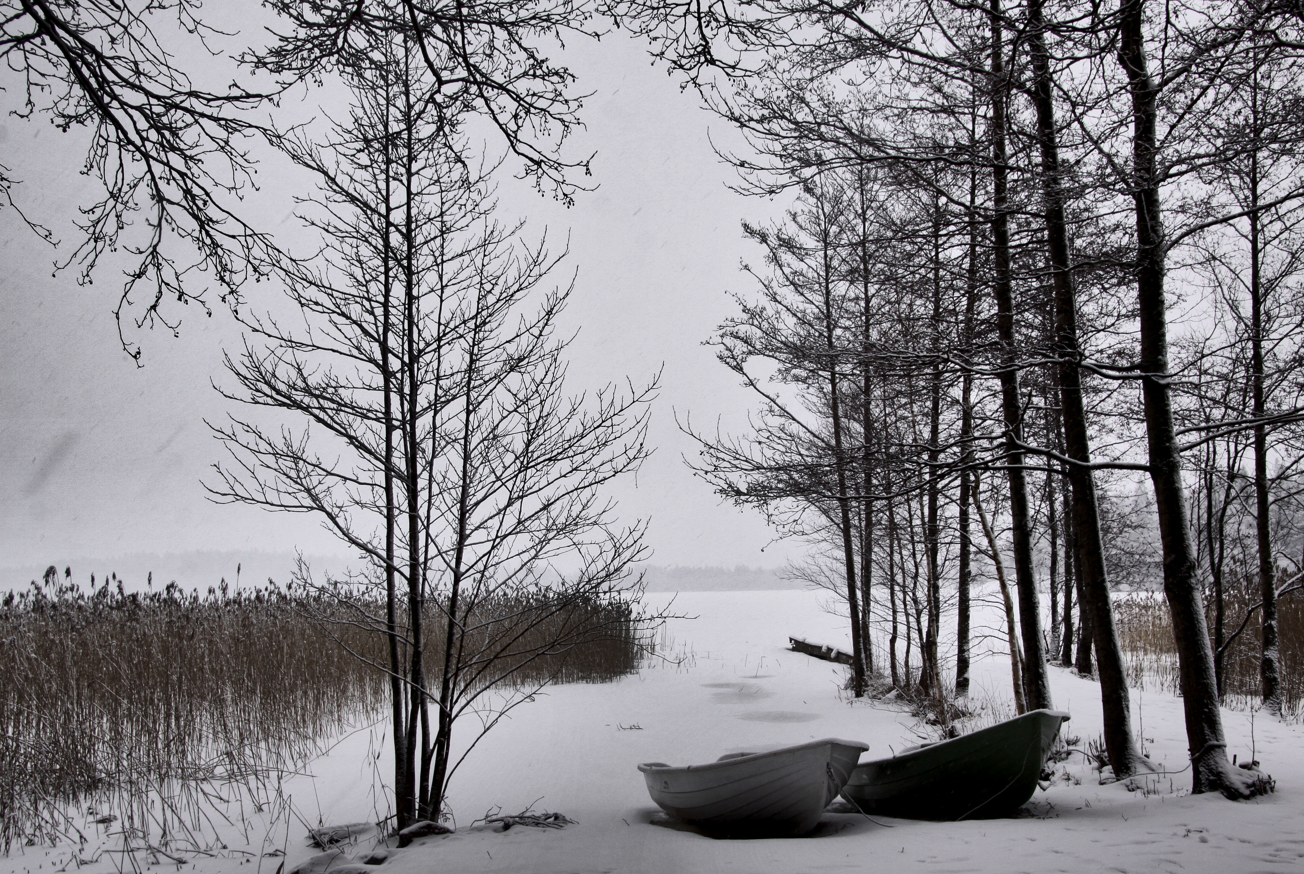 Oittaa. On the shores of Bodominjärvi lake.